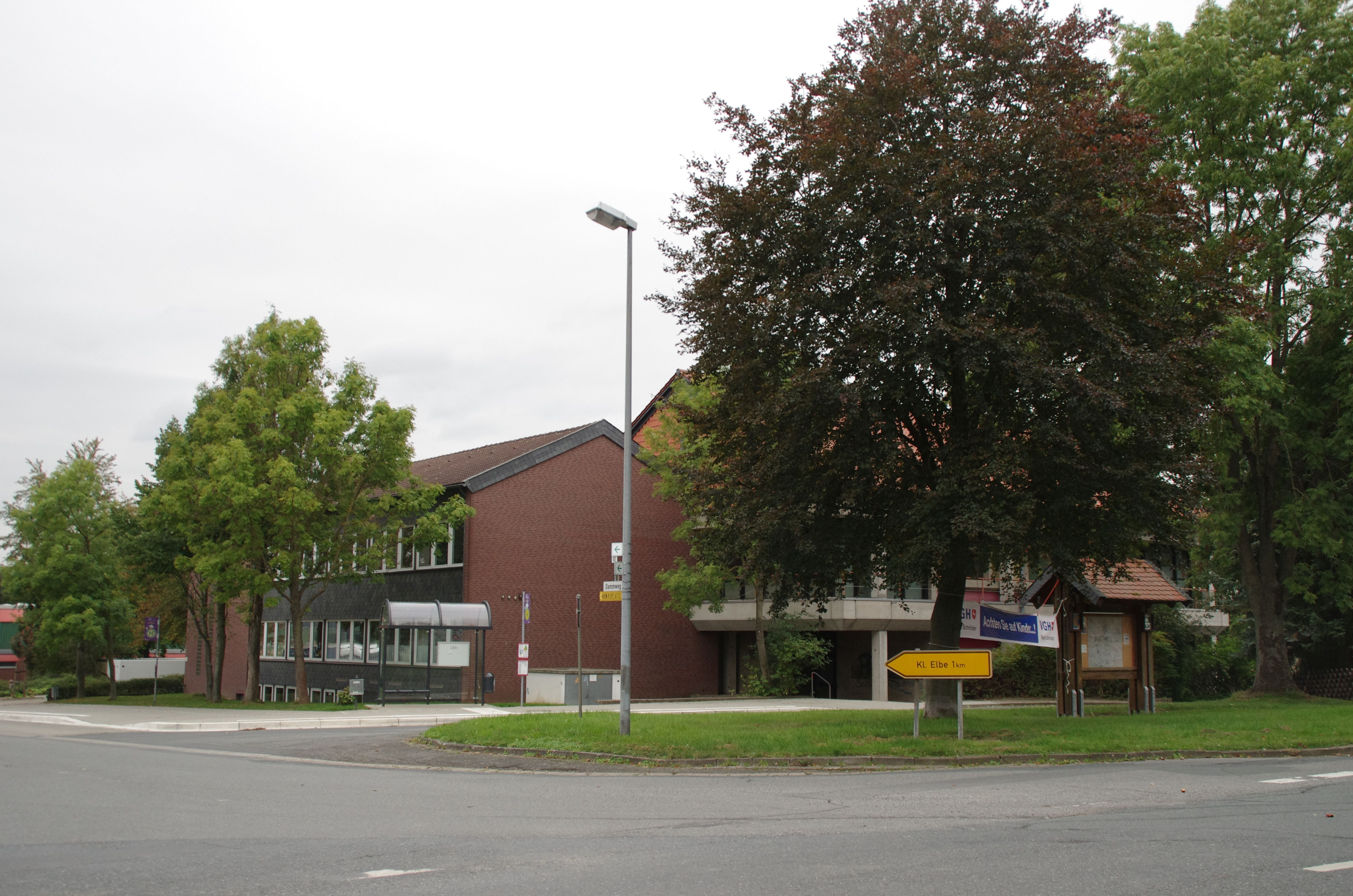 Elbe in Niedersachsen. Der Ort befindet sich im Landkreis Wolfenbüttel.